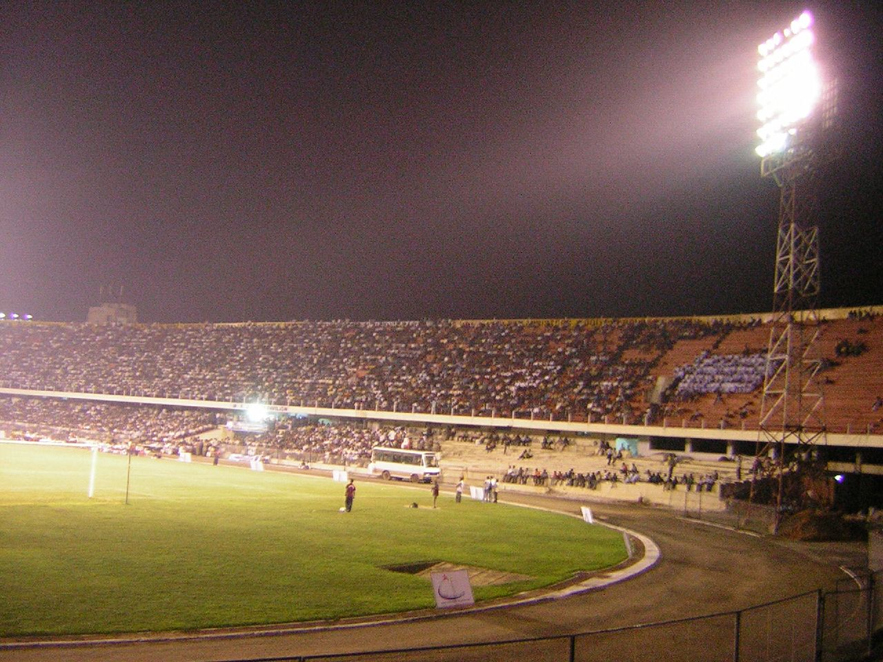 At Chandrasekaran nair stadium, Trivandrum